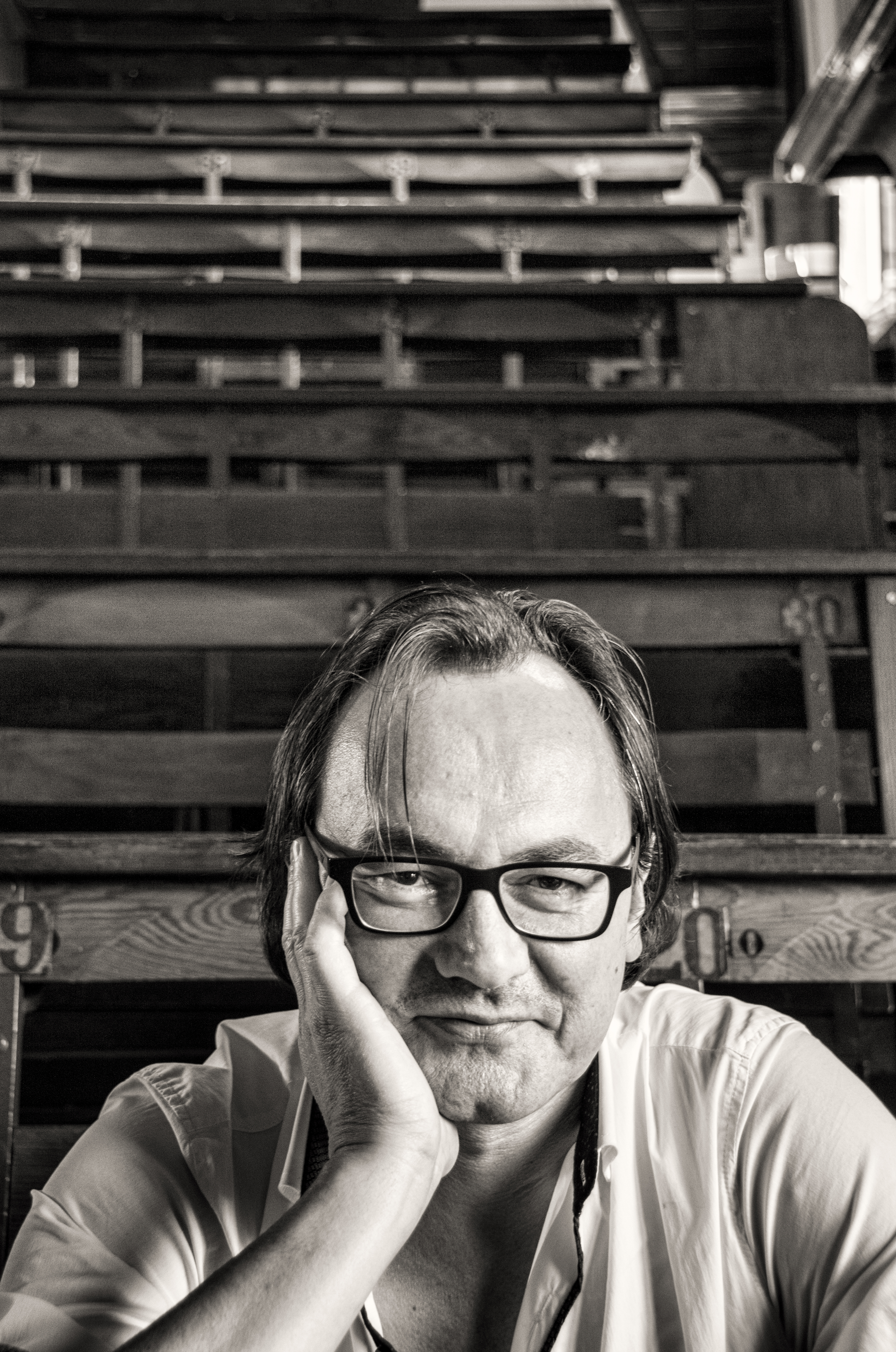 Johan Braeckman Vlaamse filosoof en hoogleraar wijsbegeerte aan de Universiteit Gent.